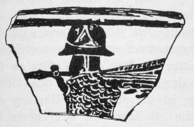 Kabirenvasenfragment mit Tropaion, 5. Jahrhundert vor Christus.